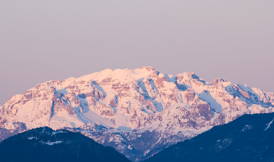 Cima Carega da Rubbio (Conco)